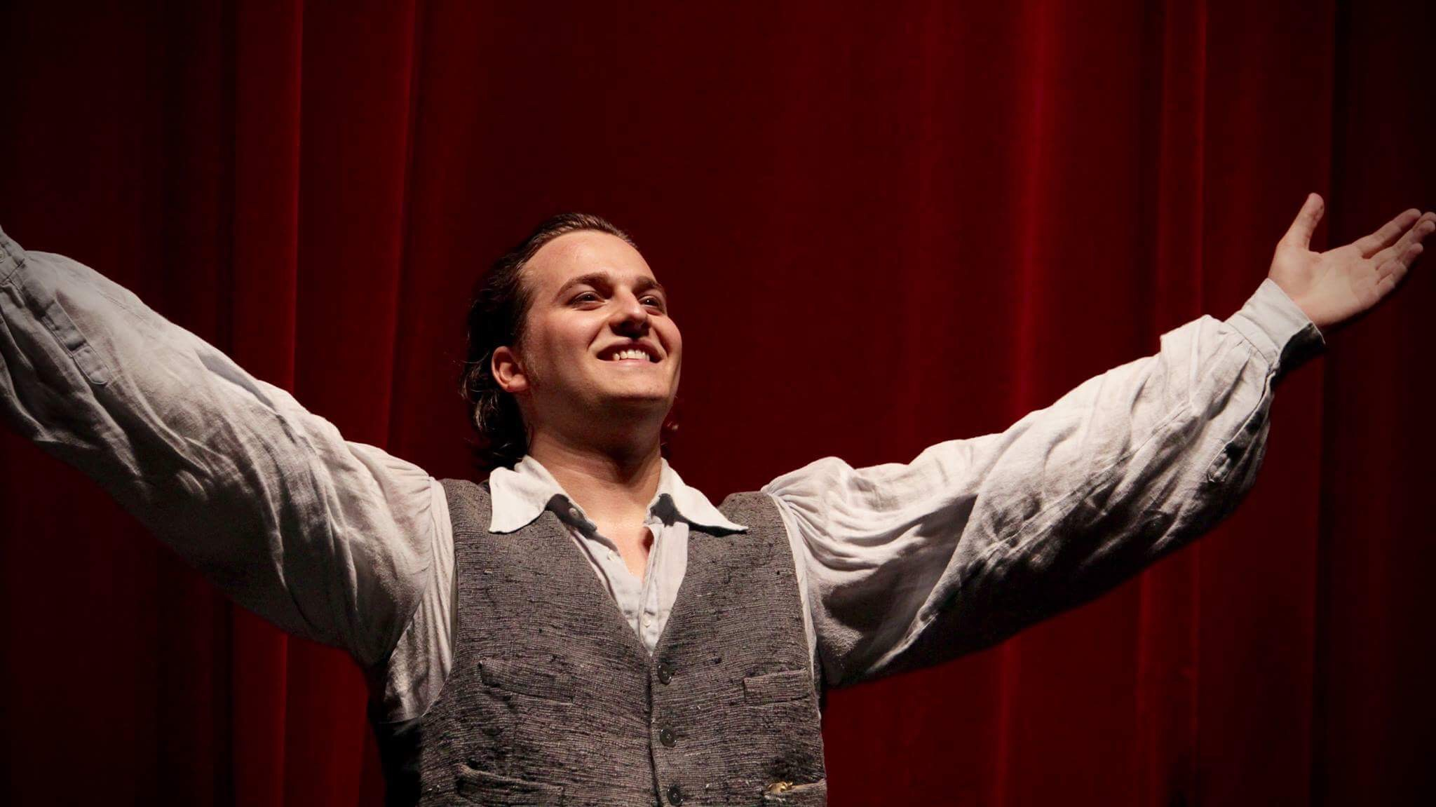 Il Barbiere di Siviglia debiut Opera Zurich 2017